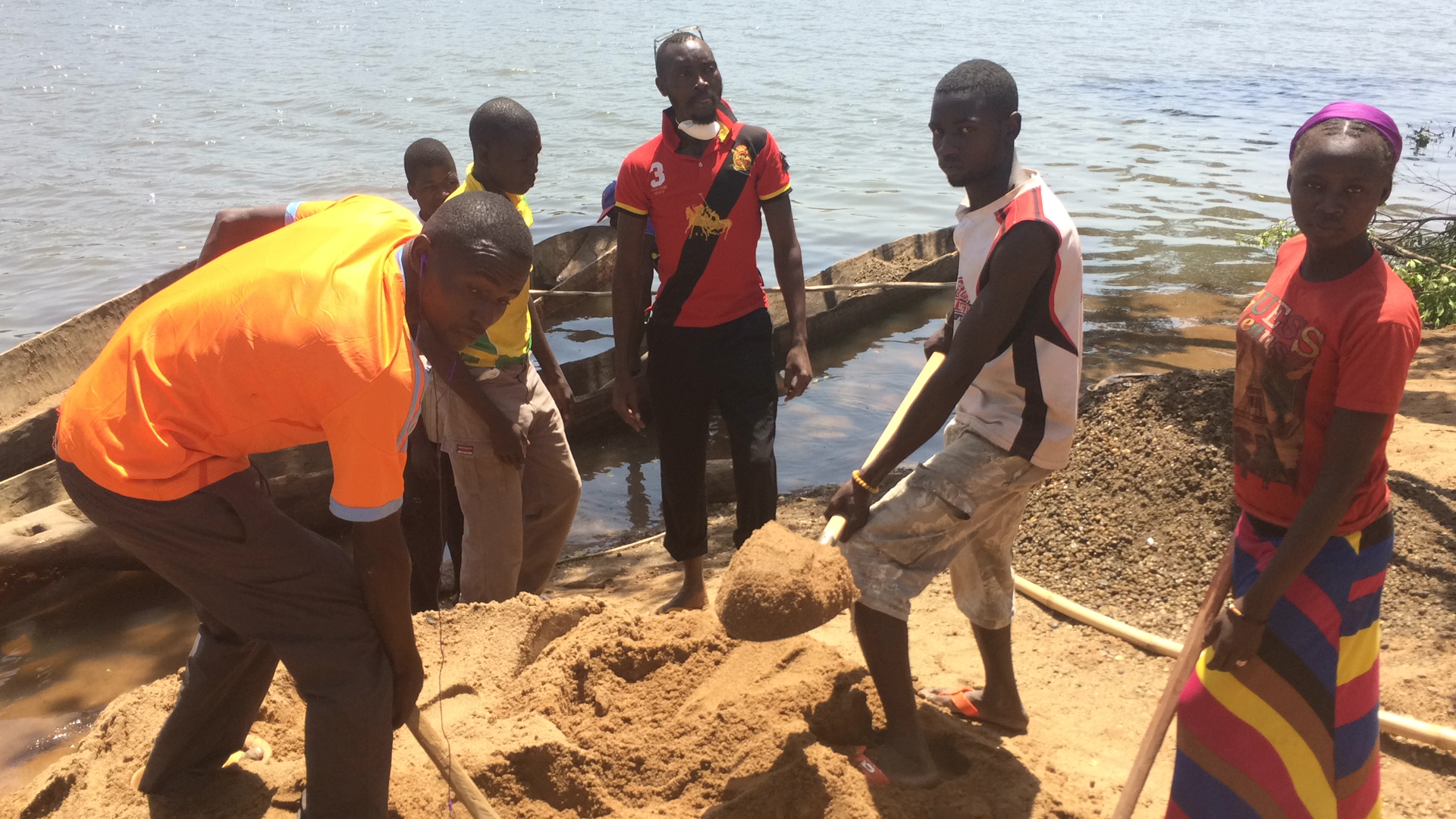 Des ex-combattants Séléka engagés dans le pré-DDR à Bria, en Centrafrique, le 25 février 2017. (VOA/Freeman Sipila)